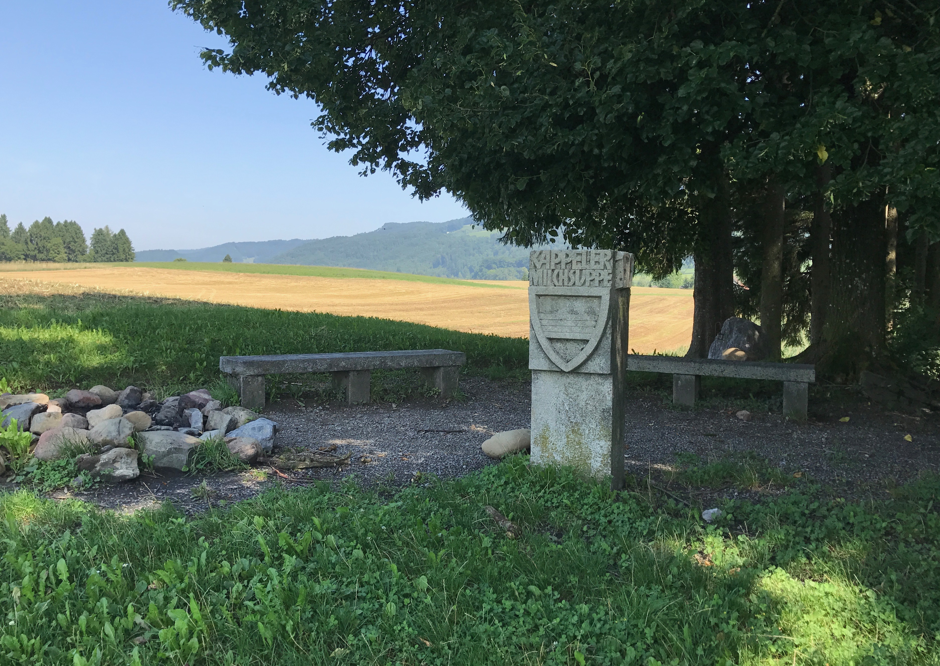 Milchsuppenstein